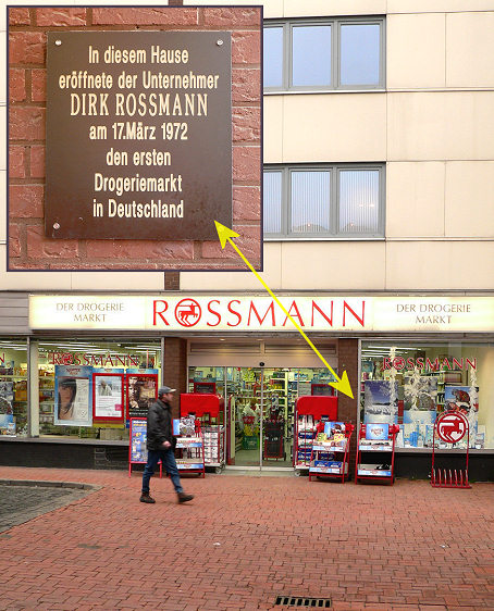 Erster Rossmann- Laden in Hannover in einer Nebenstraße der Lister Meile.